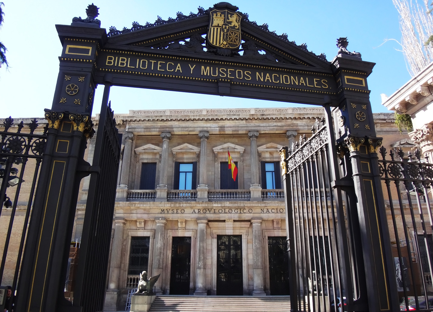 У музея археологии